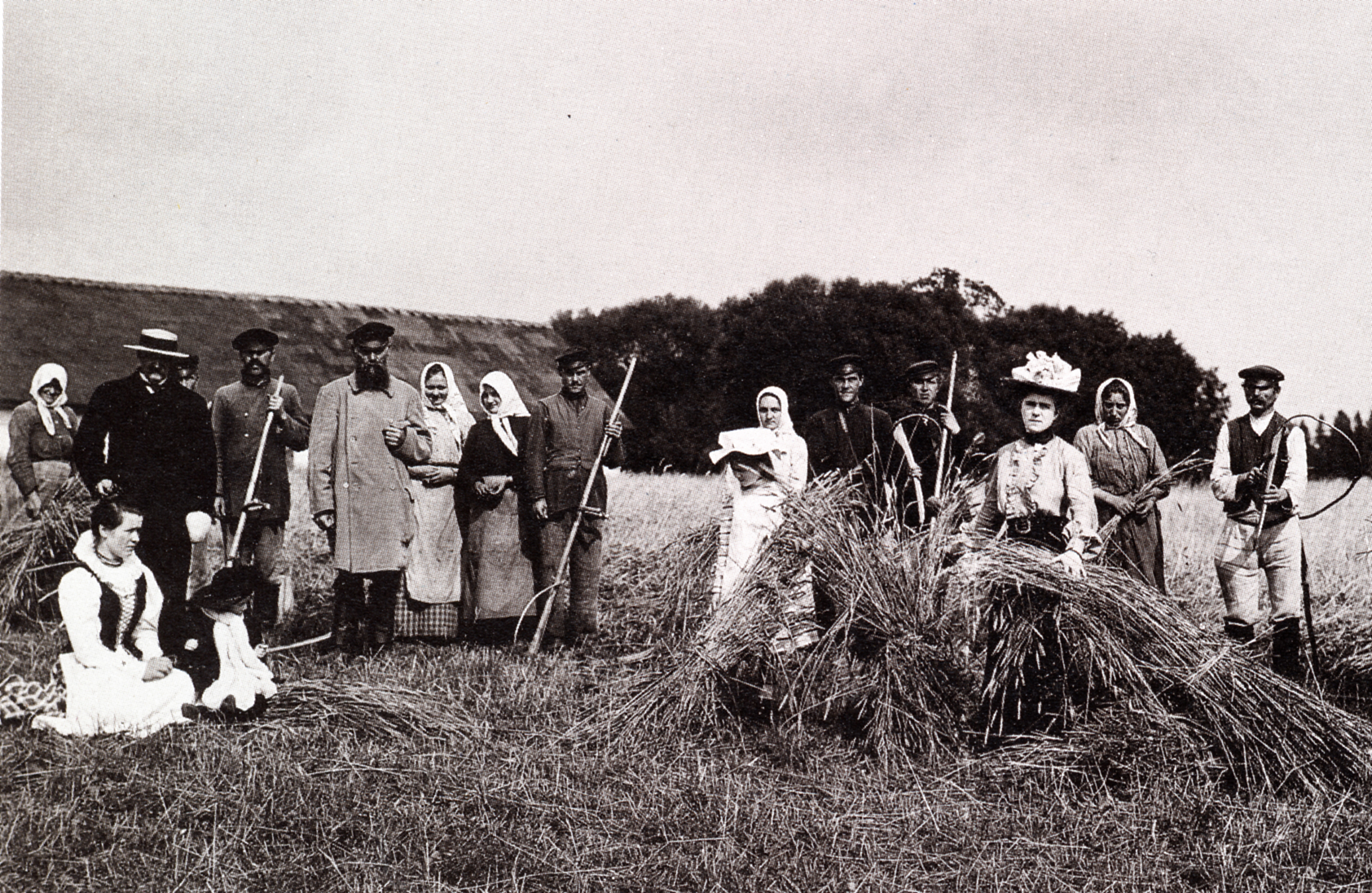 Stanisław Kazimierz Aleksander hrabia Korwin-Kossakowski z Kossaków herbu Ślepowron